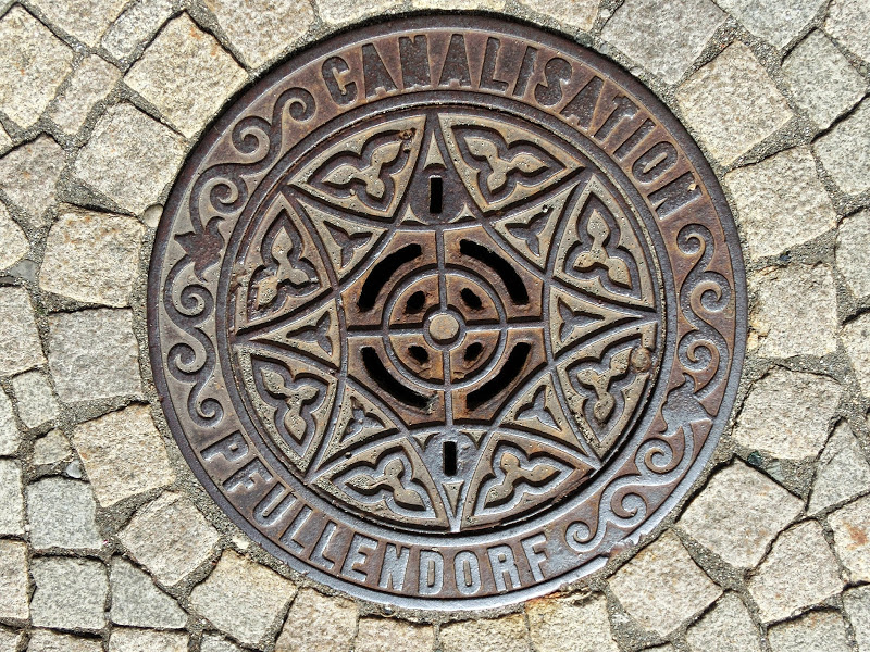 Deutschland - Baden-Württemberg - Landkreis Sigmaringen - Pfullendorf: Kanaldeckel in der Innenstadt